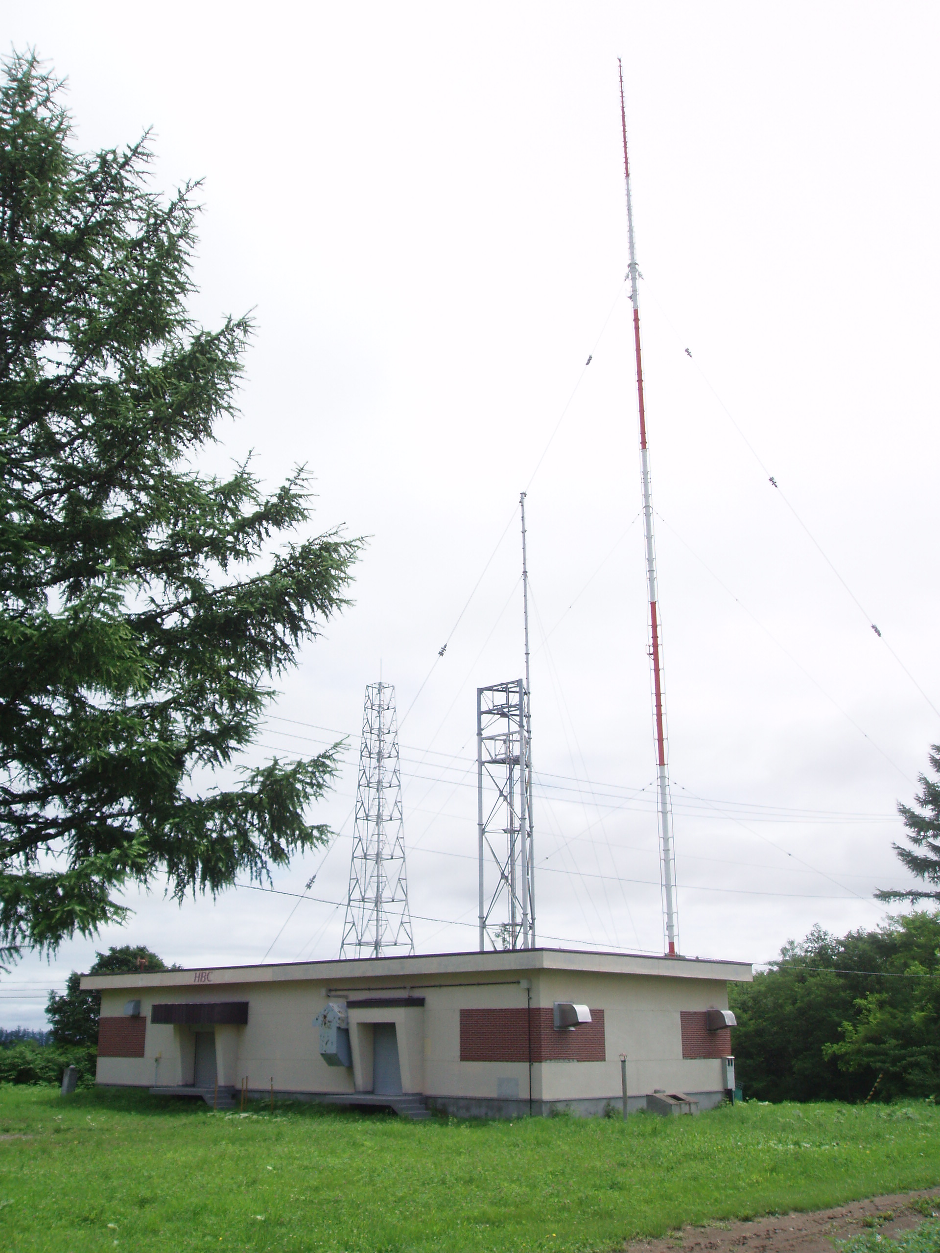 帯広送信所 HBC送信設備